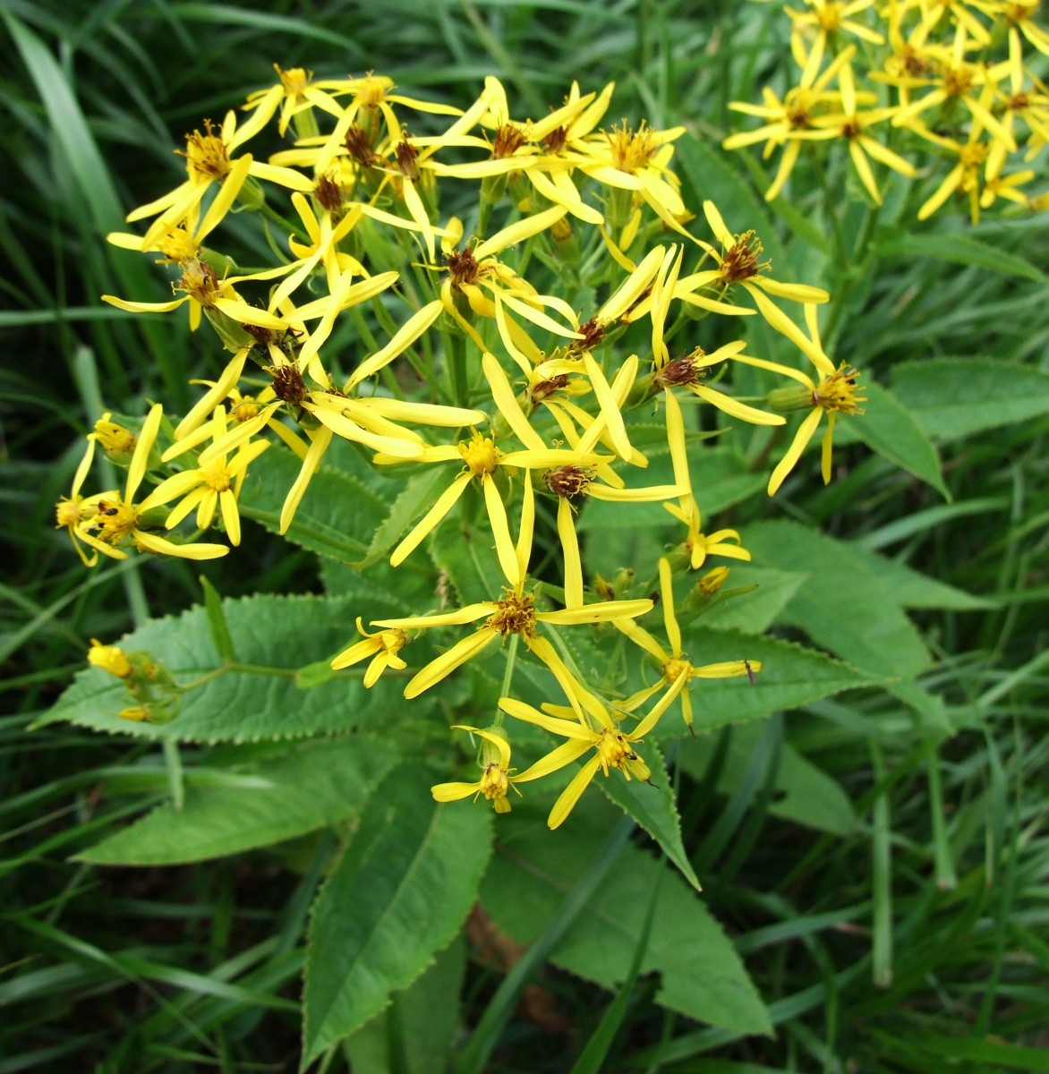 Senecio nemorensis subsp. fuchsii (pl. starzec Fuchsa), habitat: Spalona Dolina, West Tatra Mountains